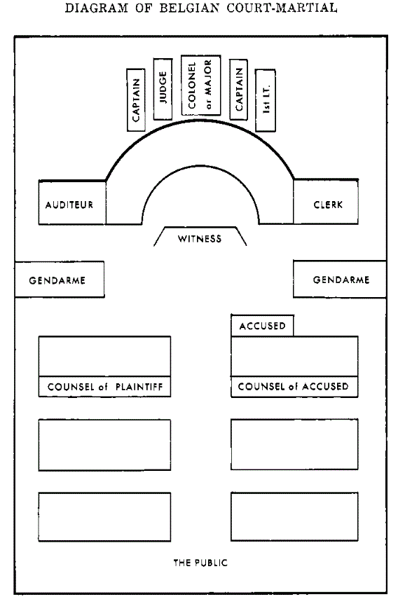 Dispostion d'une cour martiale belge en 1963